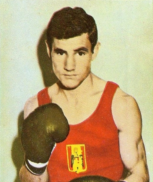 MUNCHEN/MONACO '72-PANINI-Figurina n.30- RODRIGUEZ - SPAGNA - PUGILATO